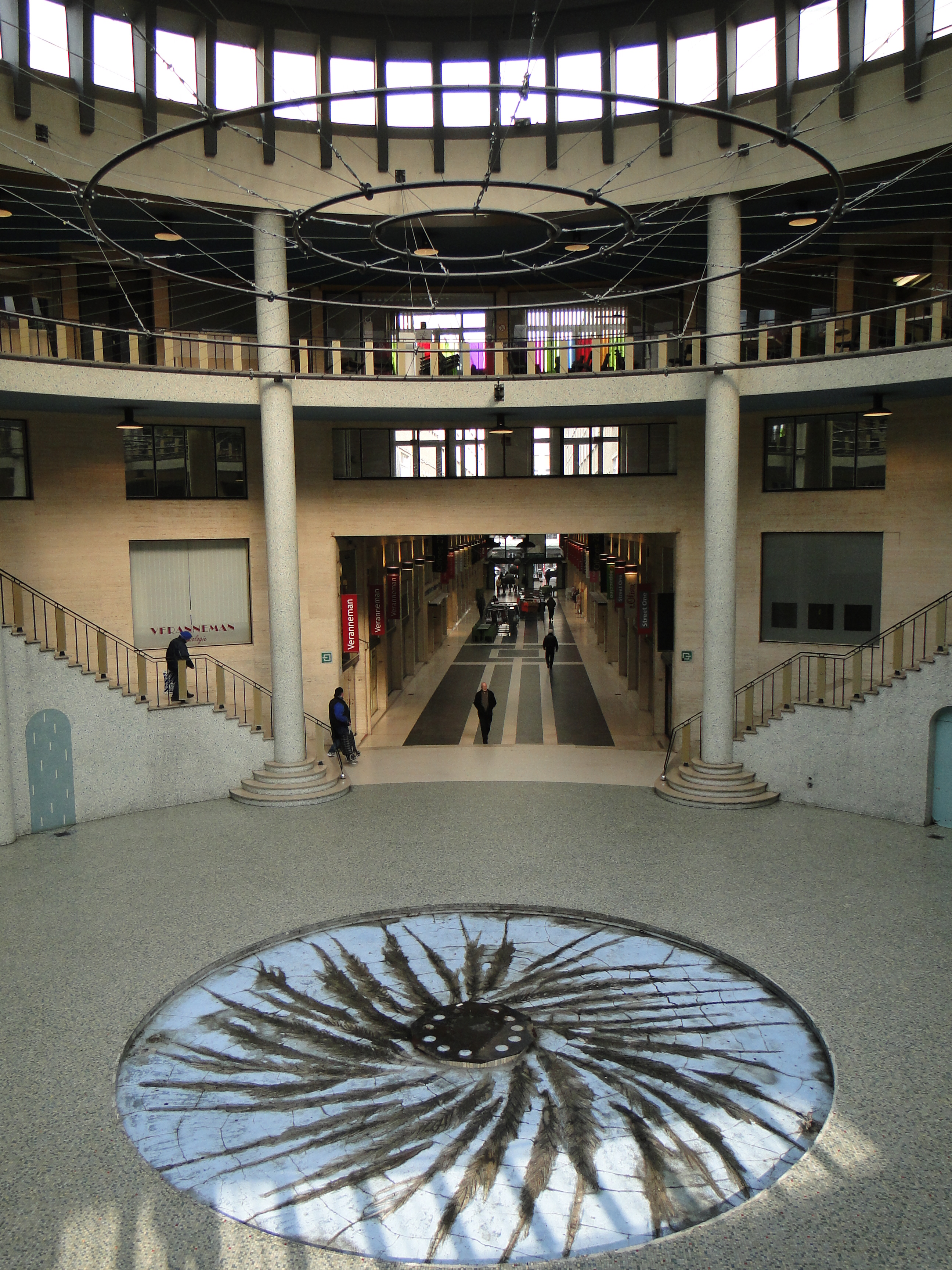 Brussel